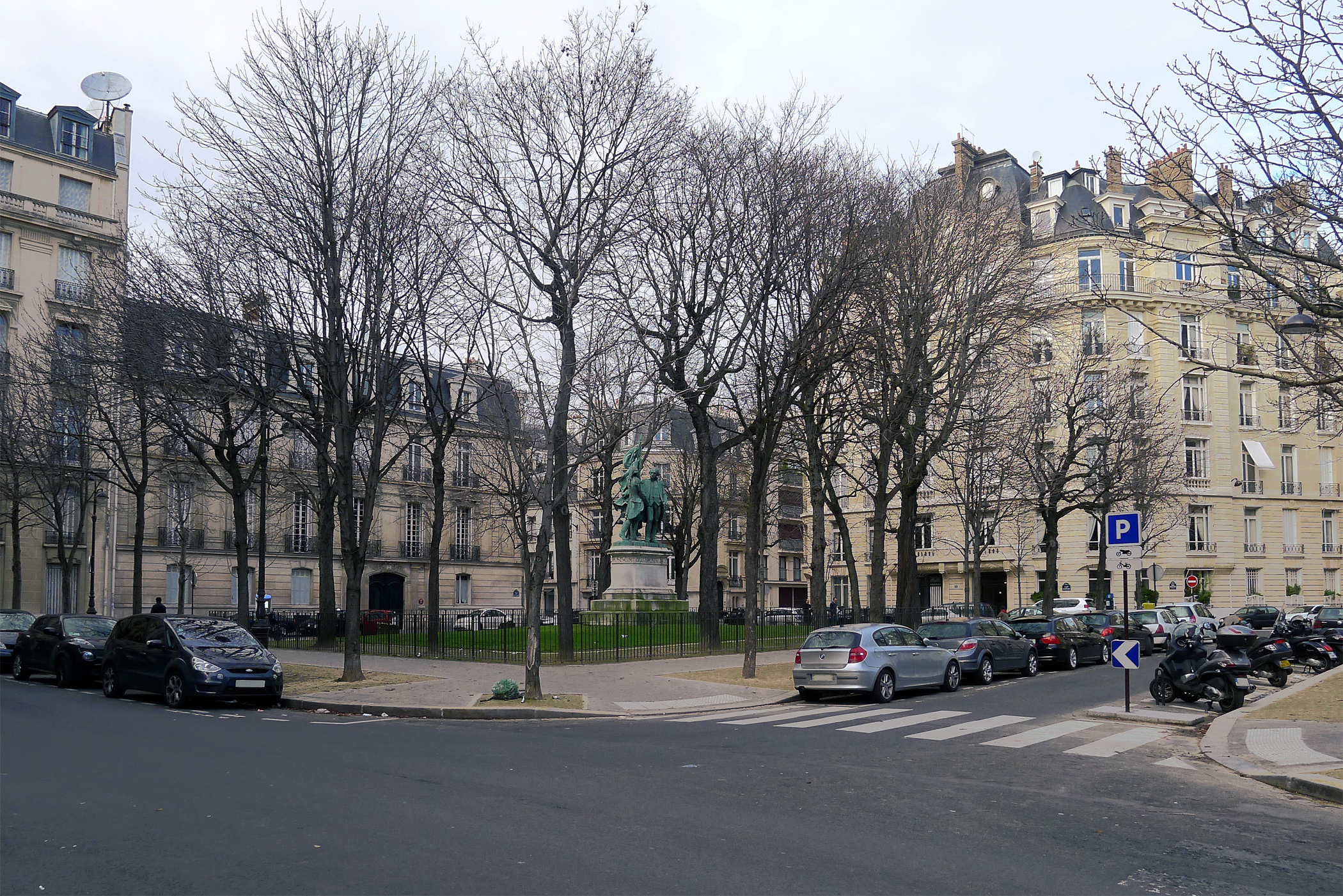 Place des États-Unis - Paris XVI